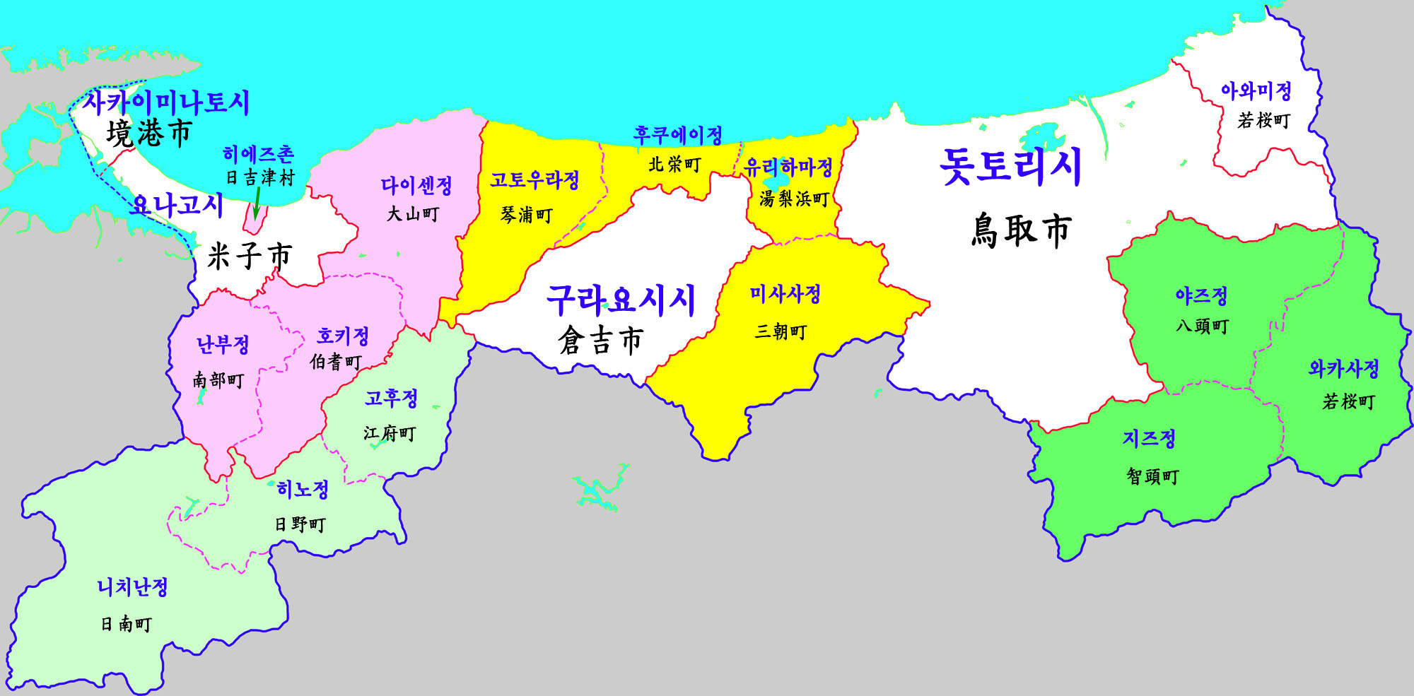 돗토리현 행정구역